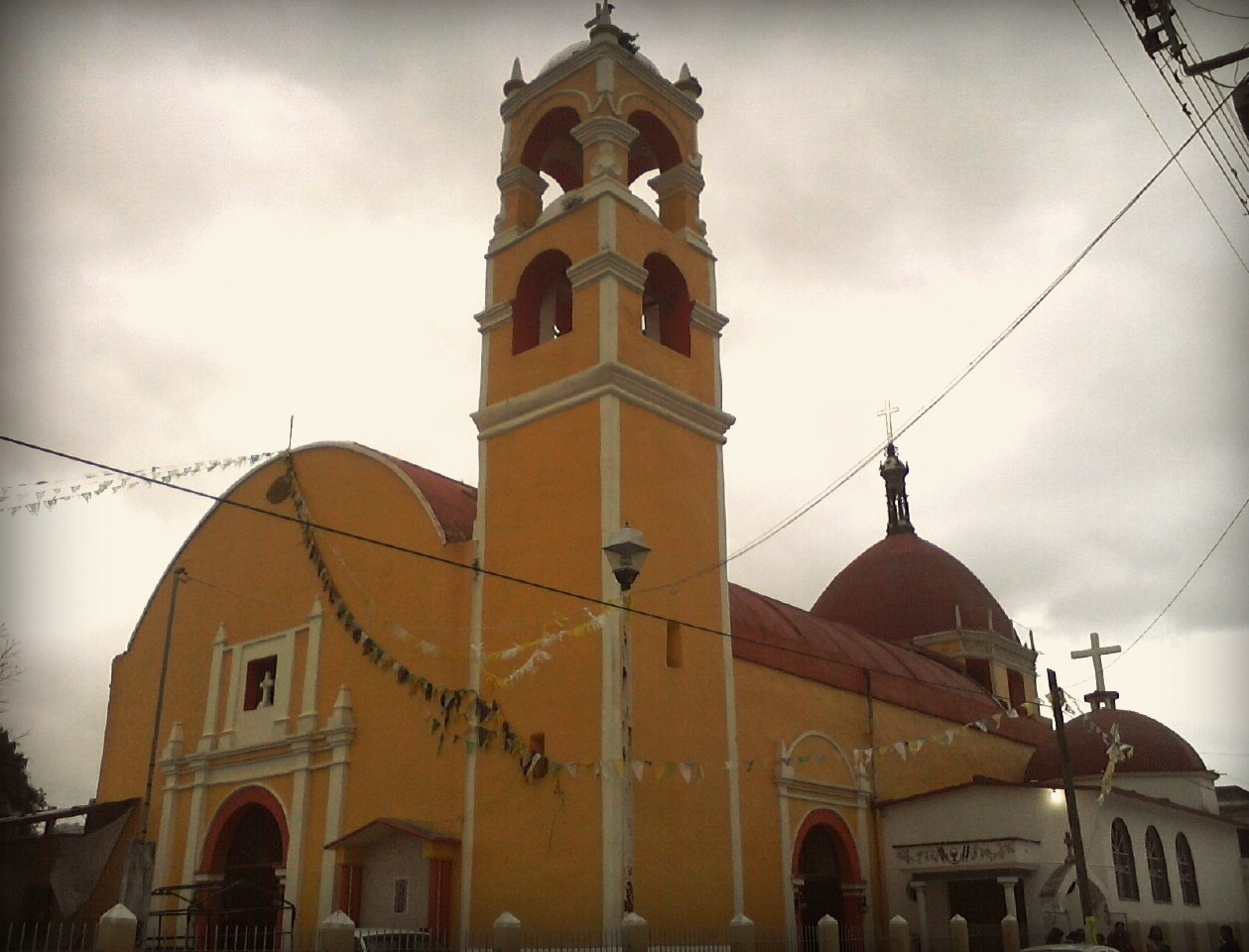 En honor a San Francisco de Asís.